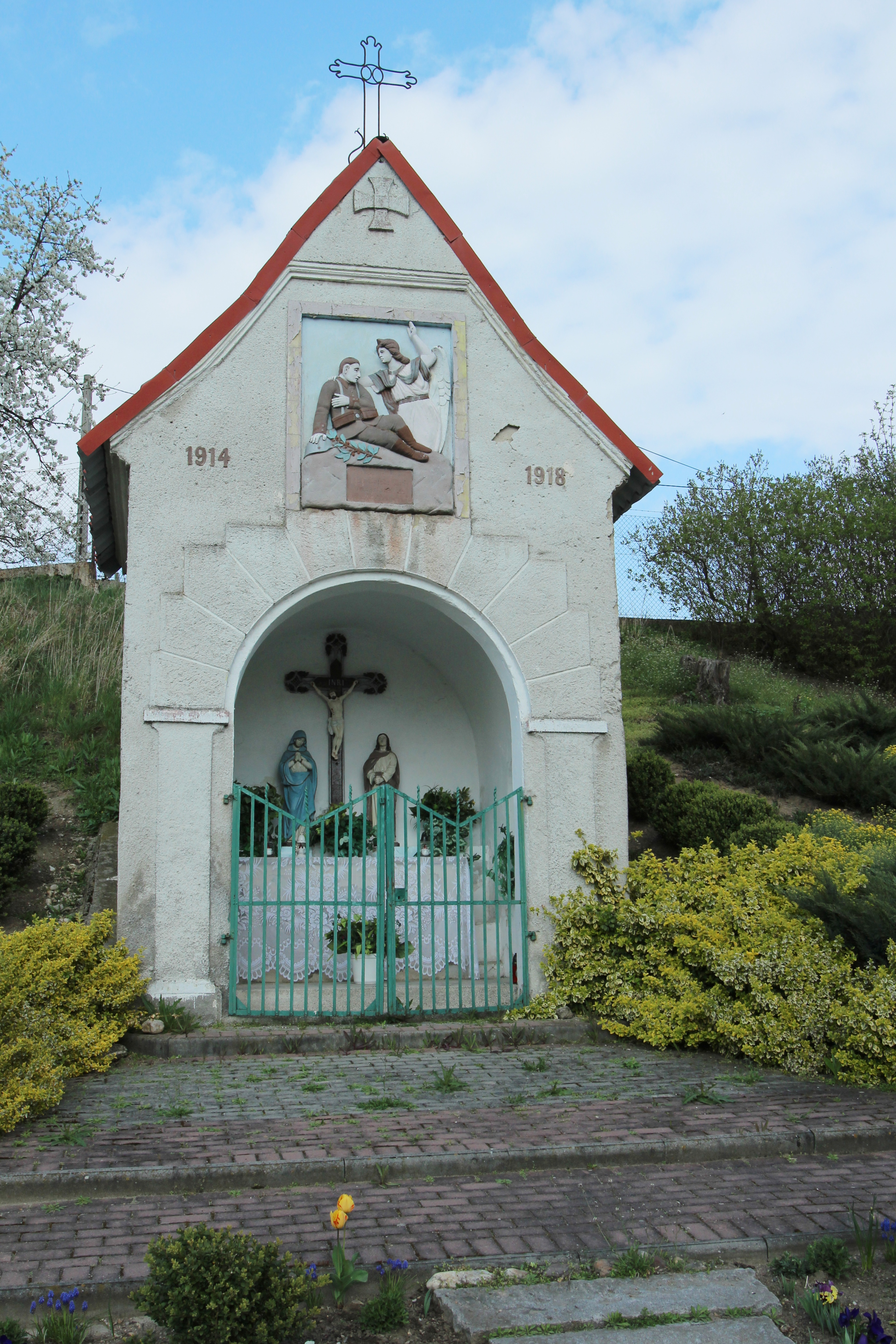 Domaszkowice – wieś w Polsce położona w województwie opolskim, w powiecie nyskim, w gminie Nysa.